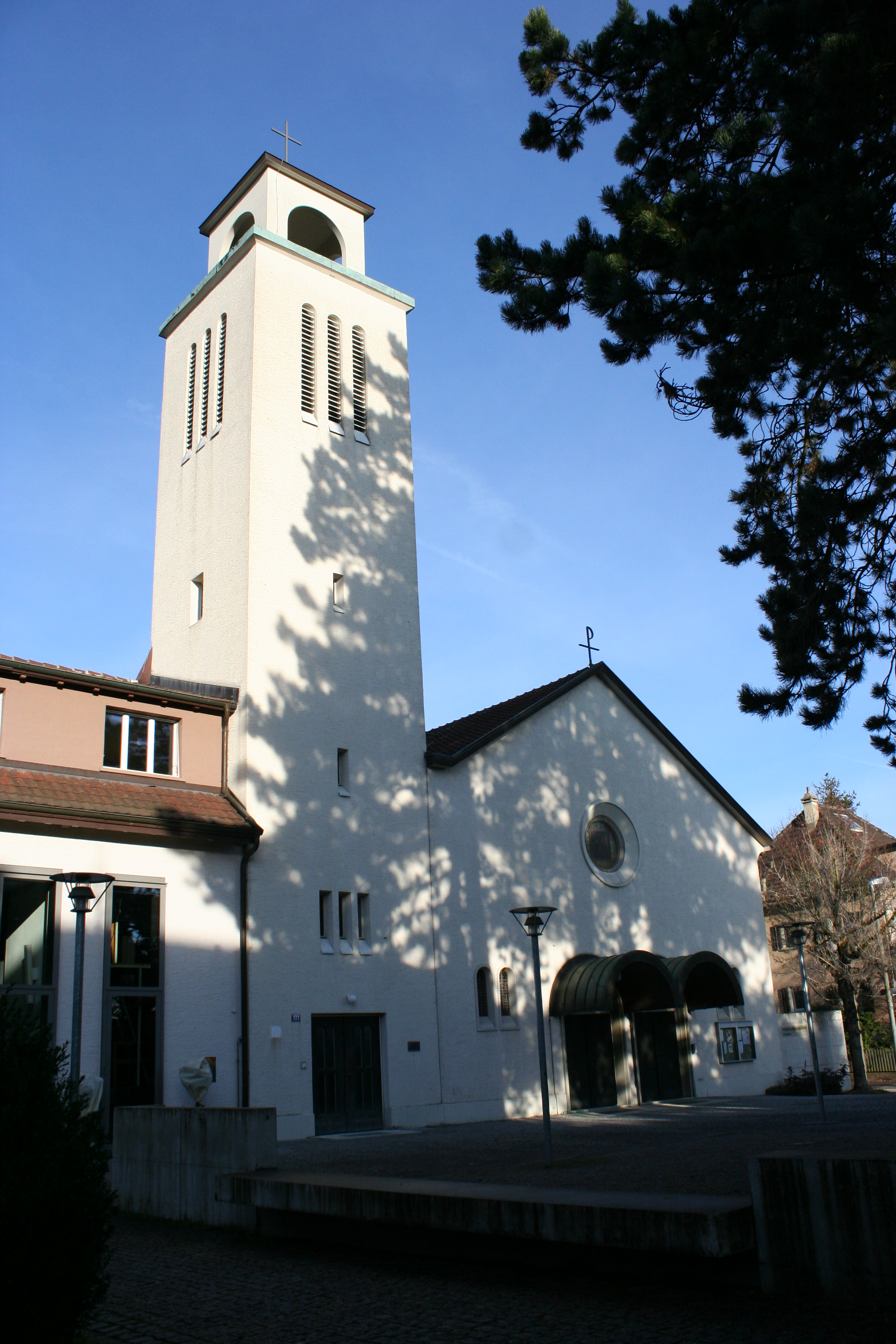 Römisch-katholische Pfarrkirche St. Marien Winterthur-Oberwinterthur, Ansicht von Südwesten